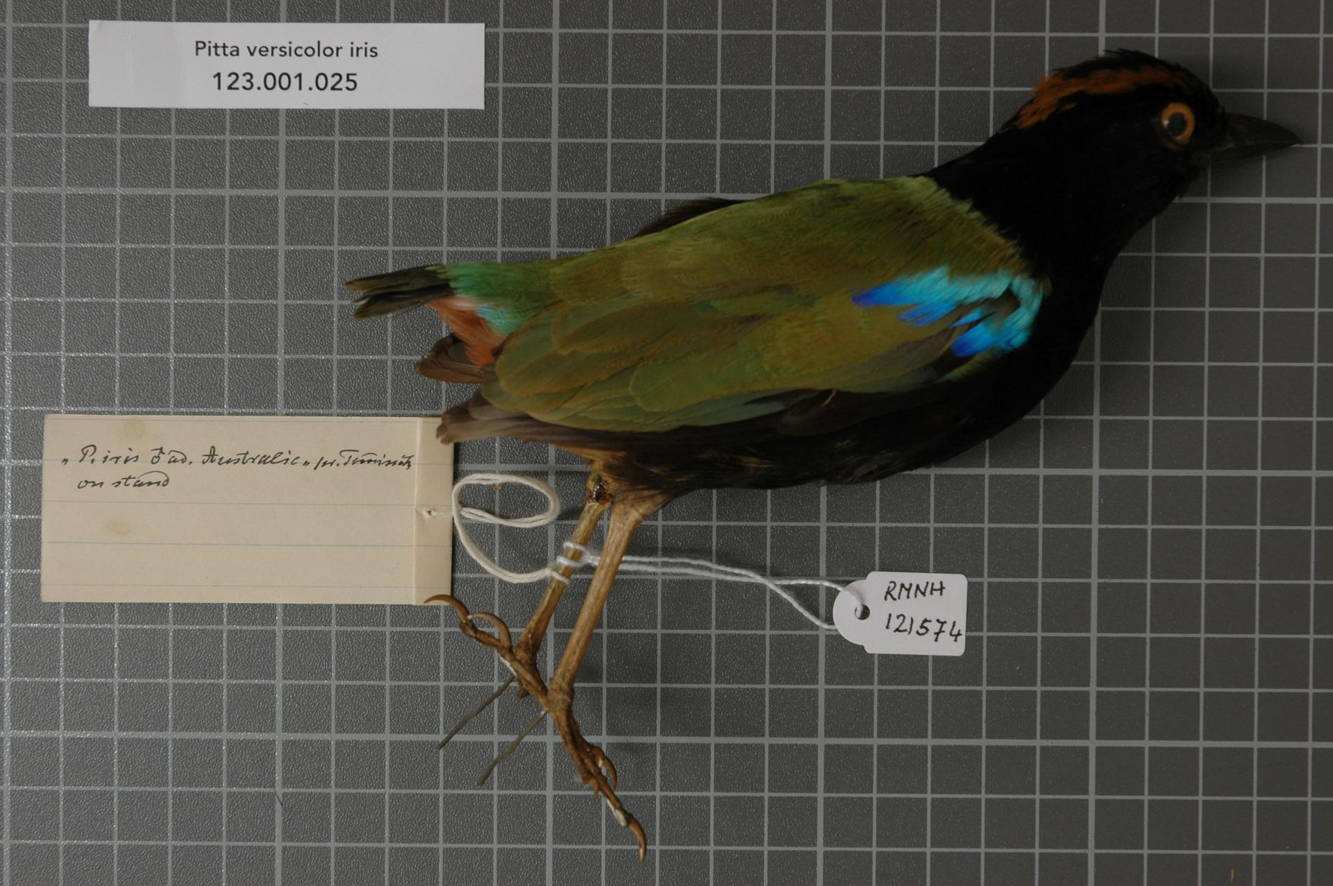 Pitta versicolor iris Gould, 1842